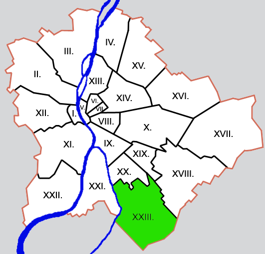 Budapest kerületei: XXIII. kerület